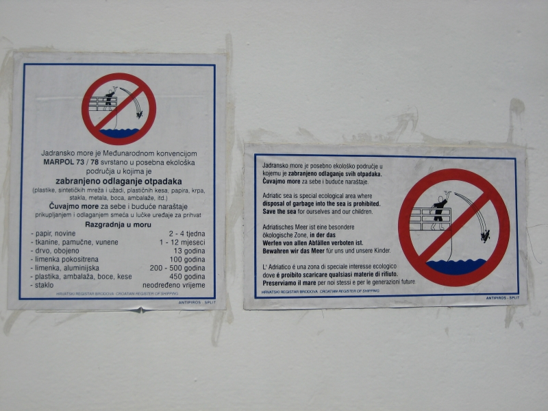 "Čuvajmo more"